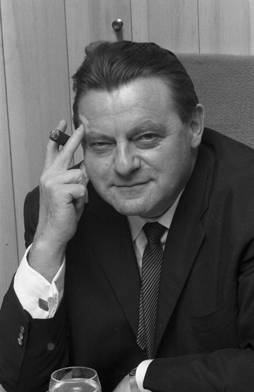 Empfang in der Landesvertretung Bayern